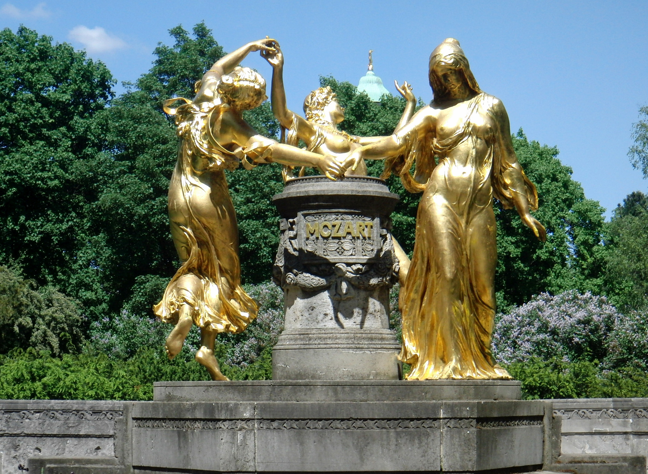 Mozartbrunnen, geschaffen vom Bildhauer Hermann Hosaeus. Stele mit Kartusche „Mozart“ wird umtanzt von drei Musen „Ernst, Anmut und Heiterkeit“. 1945 total zerstört Bruchstücke eingelagert und von 1988 bis 1991 vom Bildhauer Eberhard Wolf rekonstruiert.